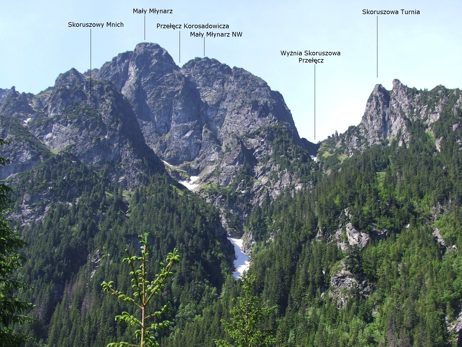 Mały Młynarz, widok z Doliny Białej Wody